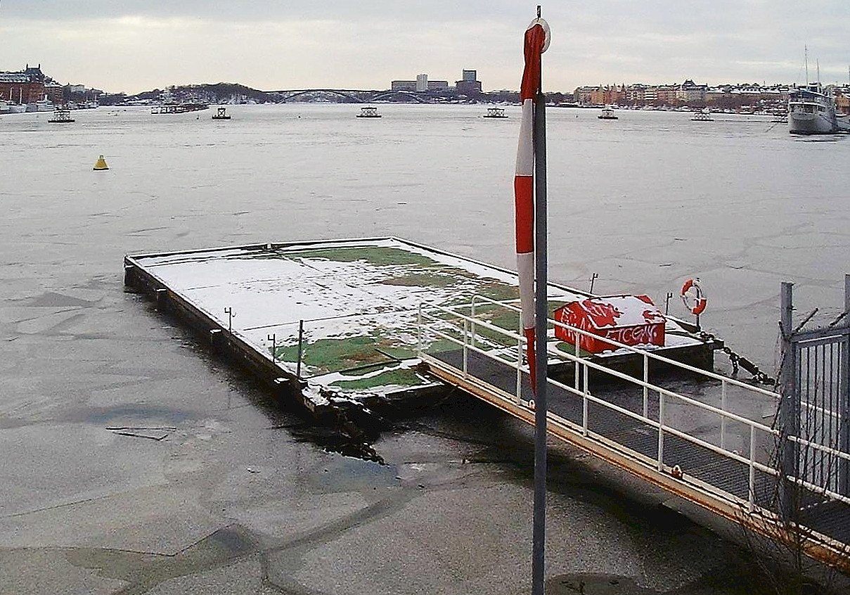 Helikopterplattan, Stockholm, in February 2007.